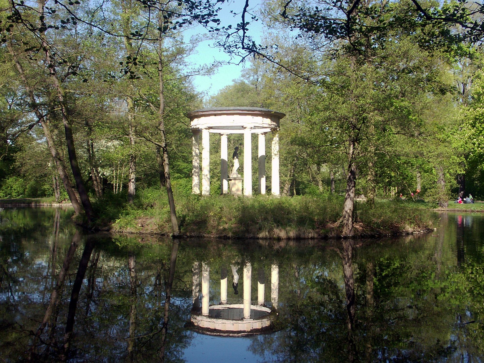 Im Abtnaundorfer Park. Figur im Pavillon von Markus Gläser